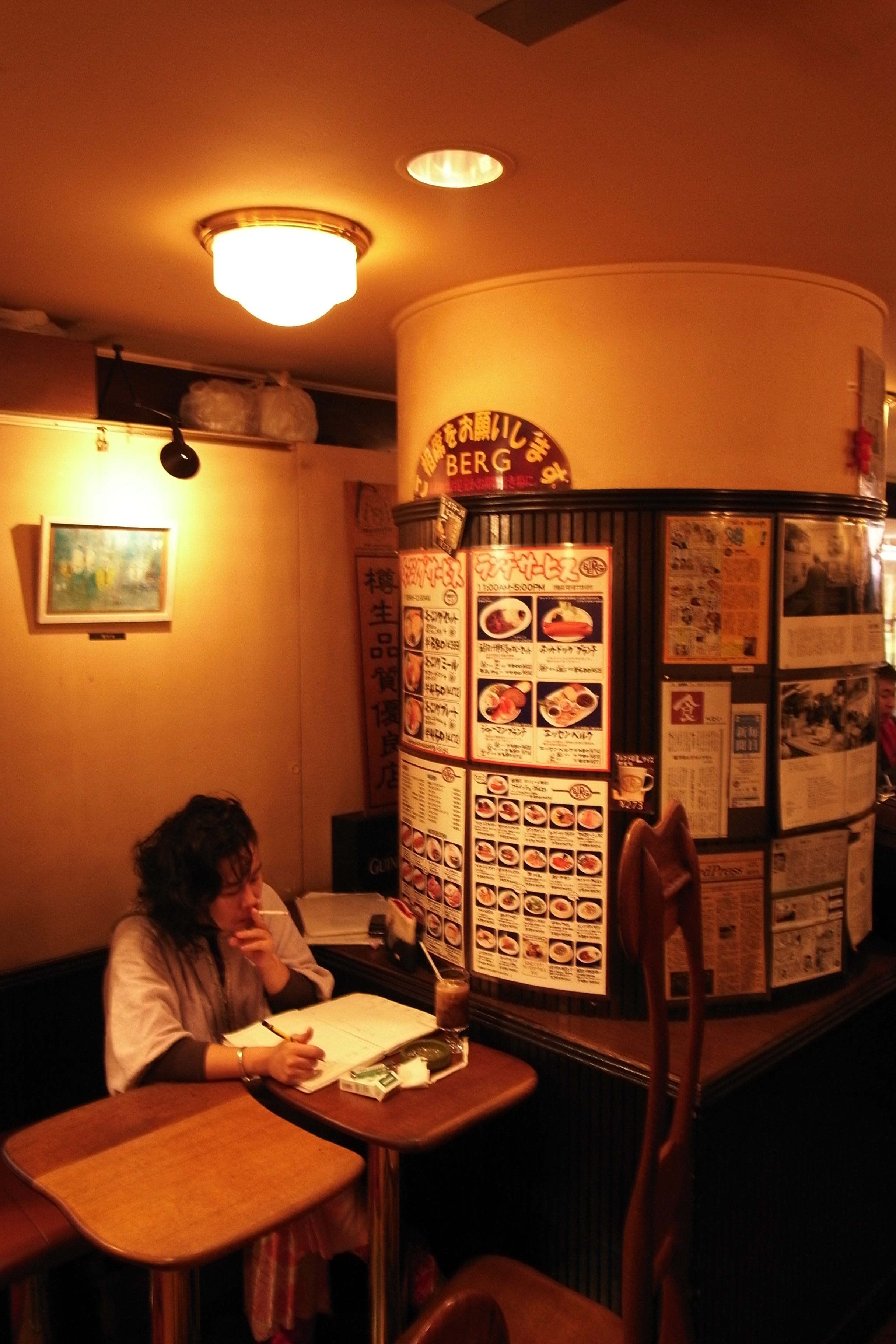 ビア&カフェBERGの駅側出入口わきのテーブル席（東京・新宿区新宿3-38-1、新宿駅東口改札最寄りの「ビア&カフェBERG ベルク」[1]）